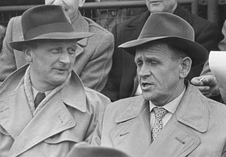 Zentralbild-Beyer Bey-Ho. 30.5.1956 Westdeutsche Olympia-Auswahl im Fußball - Der DFB (Fußball-Verband der Bundesrepublik) hat folgende Amateurspieler für die Olympischen Sommerspiele in Melbourne in Betracht gezogen. UBz: Der Bundestrainer Sepp Herberger (rechts) im Gespräch mit dem Staatstrainer der DDR, Oswald Pfau.